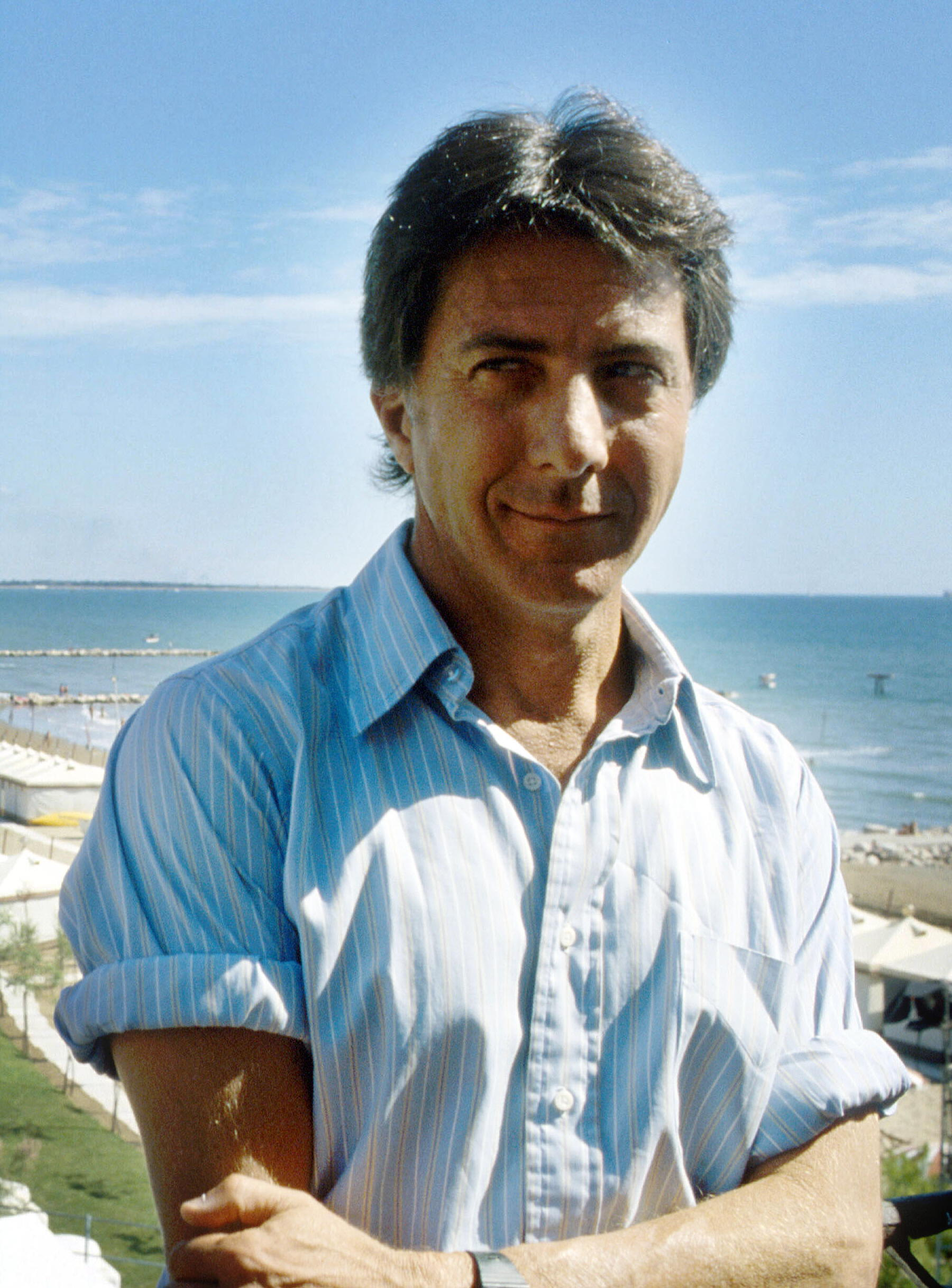 L'acteur américain Dustin Hoffman à la Mostra del cinema di Venezia de 1984, image recadrée de File:Dustin Hoffman 01.jpg, septembre 1984.